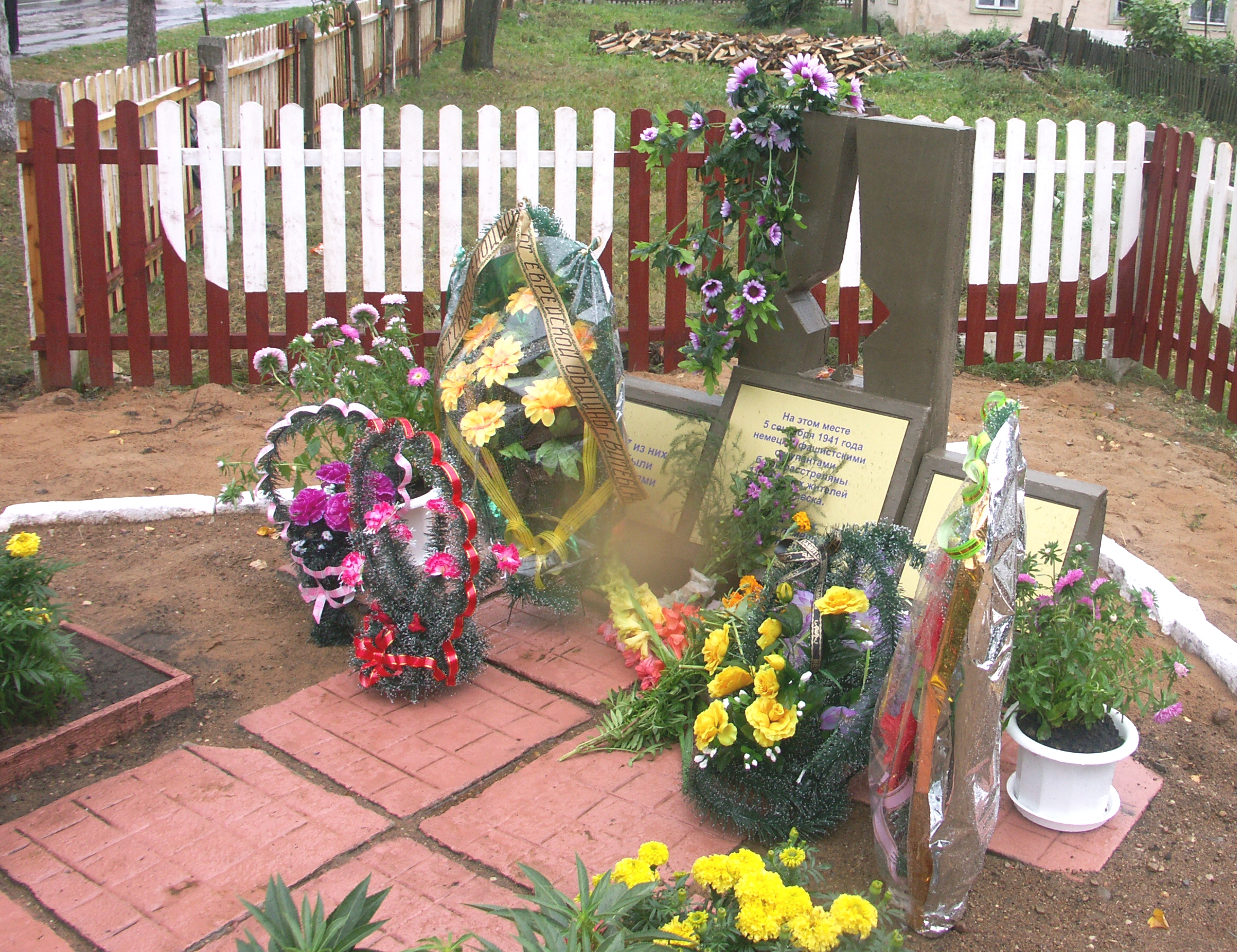 Памятник на месте расстрела евреев Богушевска 5 сентября 1941 года.